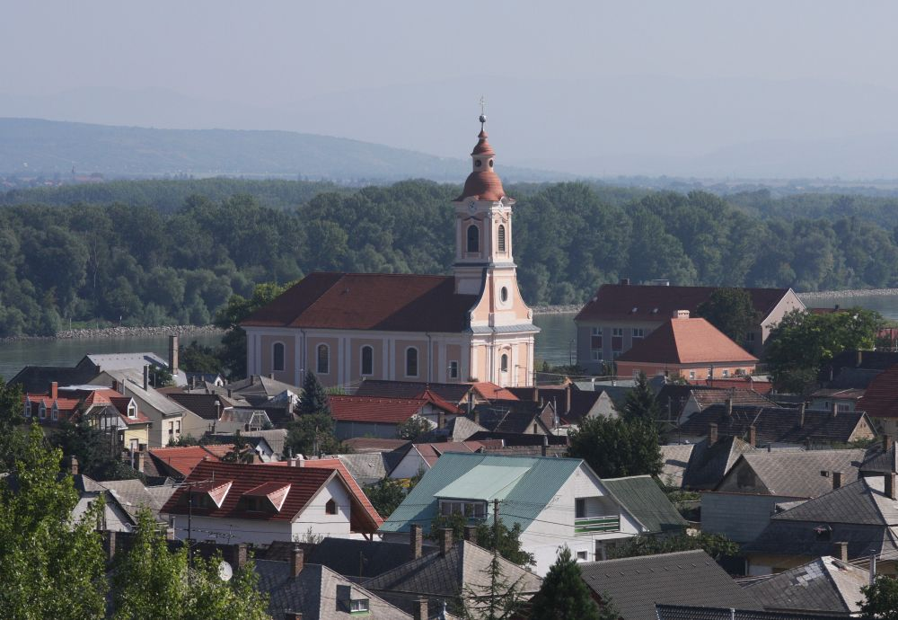 Nyergesújfalu, templom a Sánc-hegyről